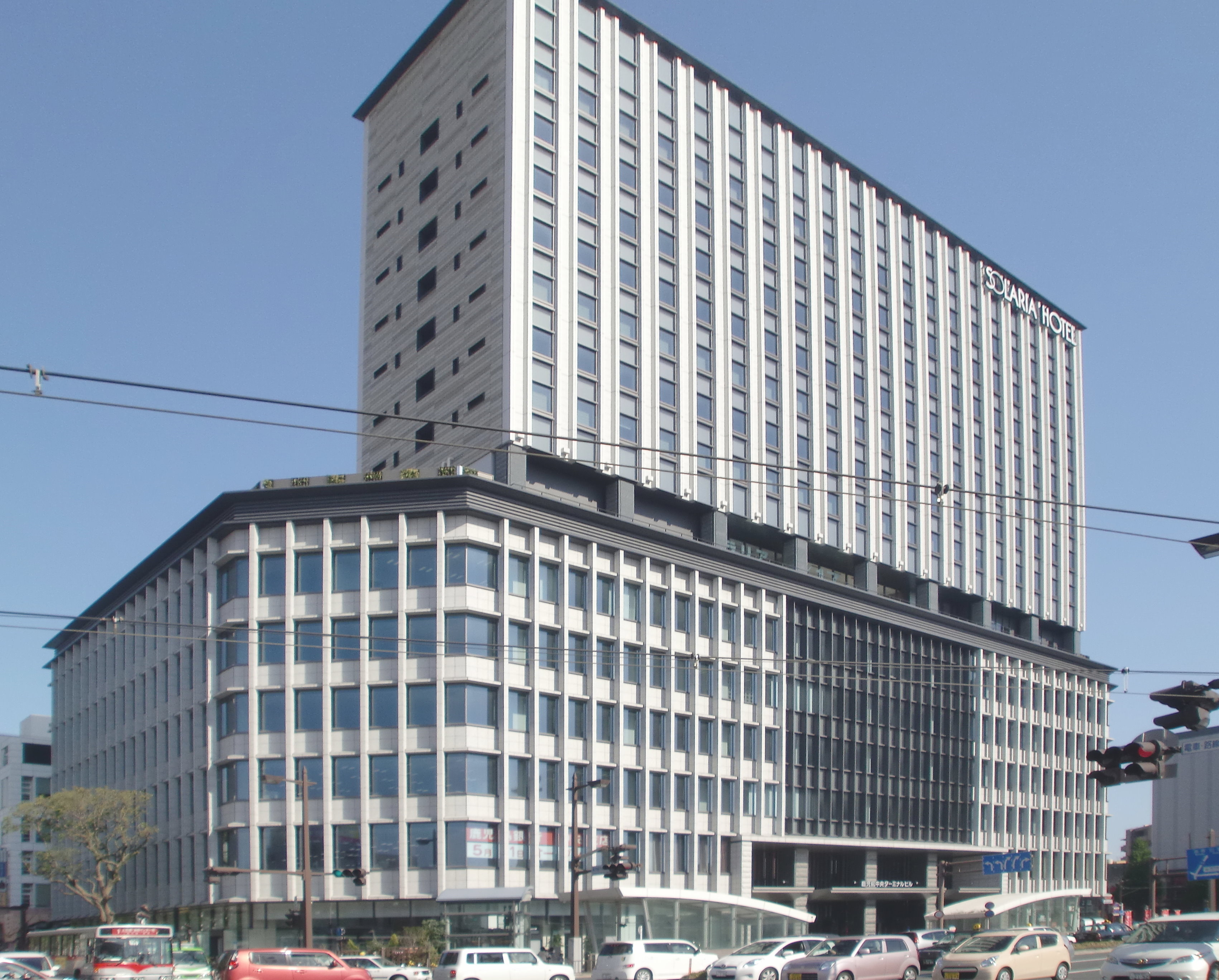 鹿児島中央ターミナルビルの画像。ソラリア西鉄ホテル鹿児島及び各種飲食店が入居する。